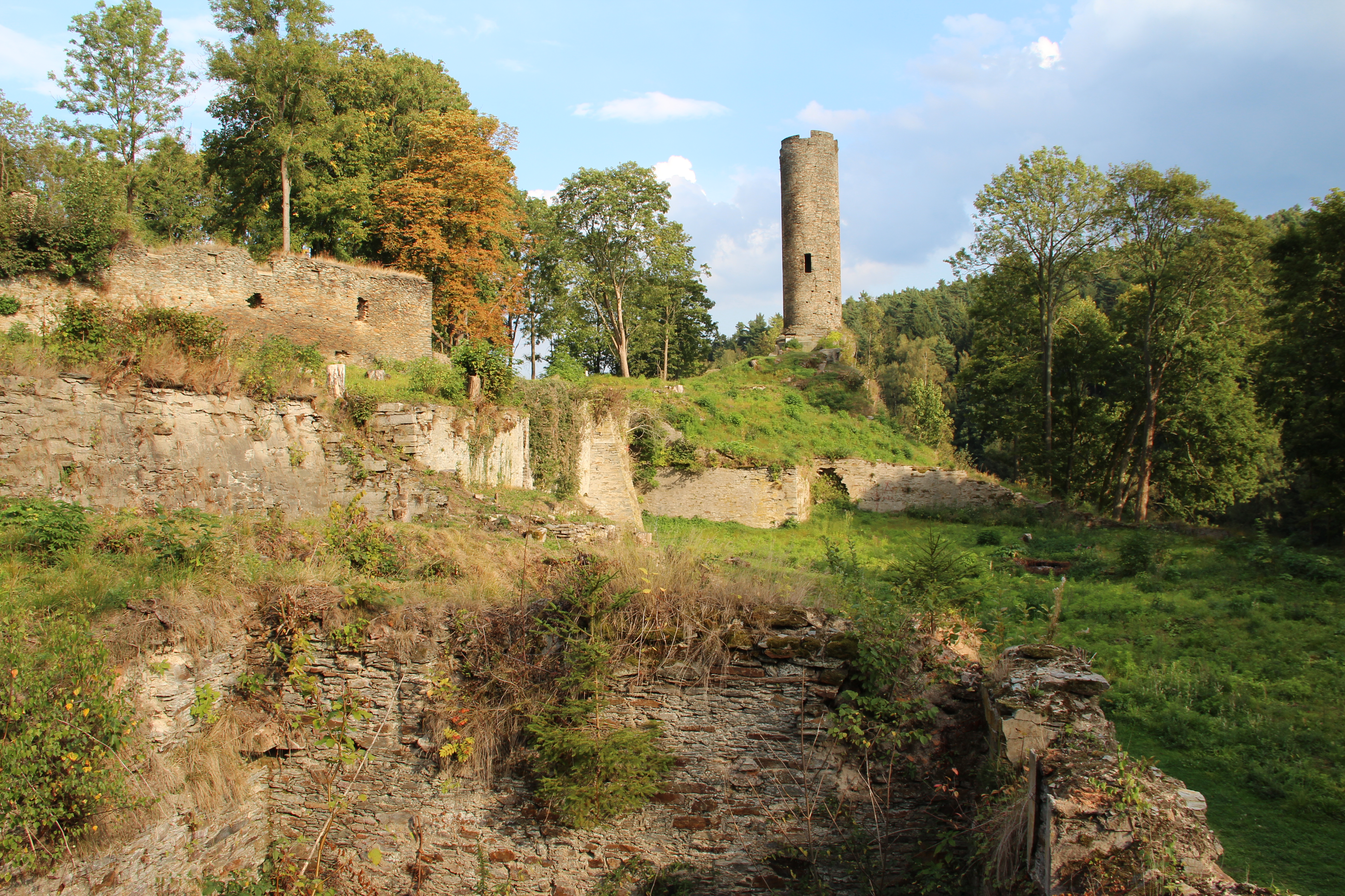 Reste der Schlossanlage in Podhradi (Neuberg)